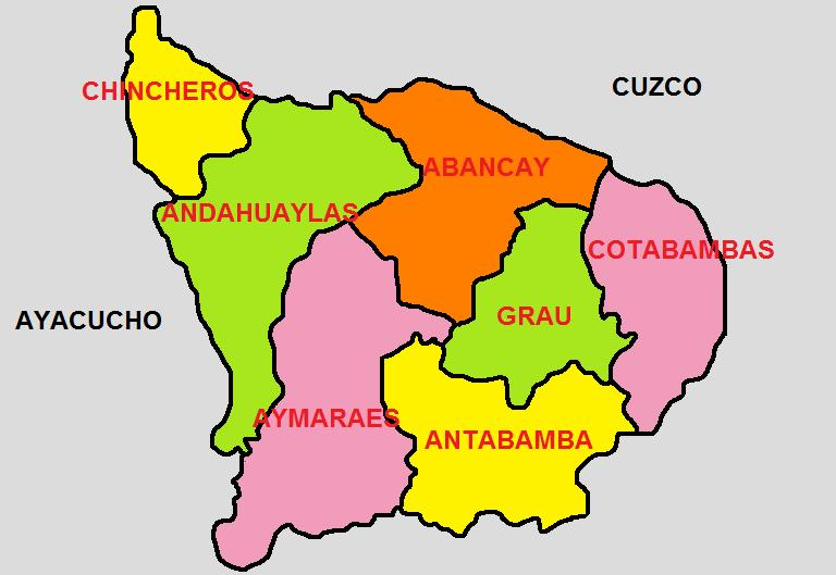 Imagen que muestra la División Politica del Departamento de Apurimac, una de las 25 circunscripciones en que se divide el Perú